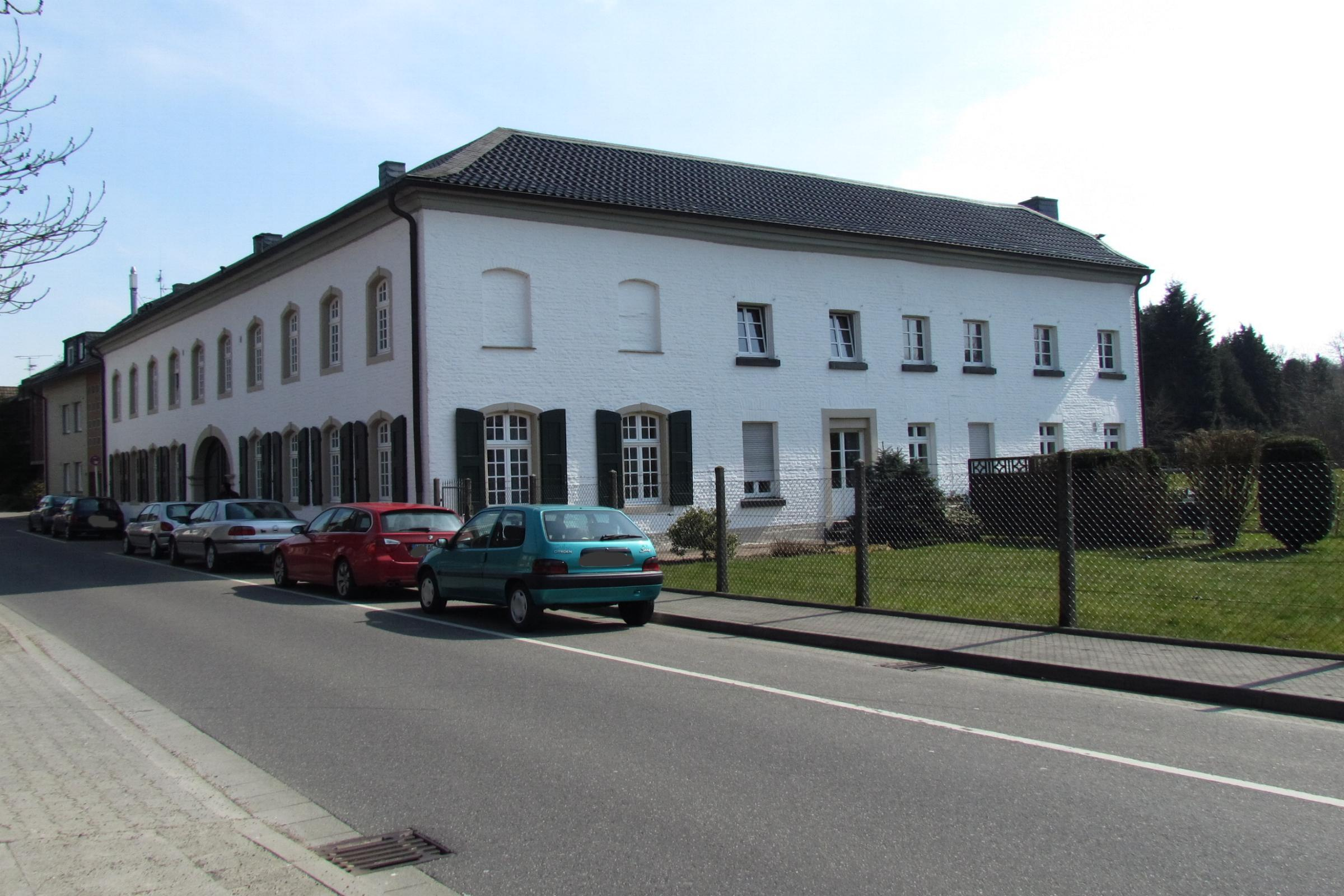 Wassermühle in der Stadt Mönchengladbach